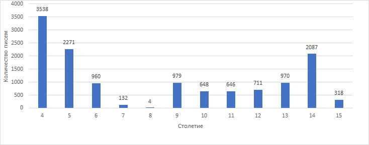 Количество византийских писем по столетиям. По данным из M. GRÜNBART, “Byzantinische Briefflorilegien: Kopieren und Sammeln zur Zeit der Makedonenkaiser”, in: Encyclopedic Trends in Byzantium? Proceedings of the International Conference Held in Leuven, 6-8 May 2009, ed. P. VAN DEUN and C. MACÉ (Leuven, 2011: Orientalia Lovaniensia analecta 212), pp. 77-88